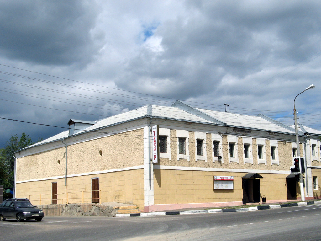 городской театр в г. Чехов (Московская область); theater in Chekhov (Moscow Oblast)